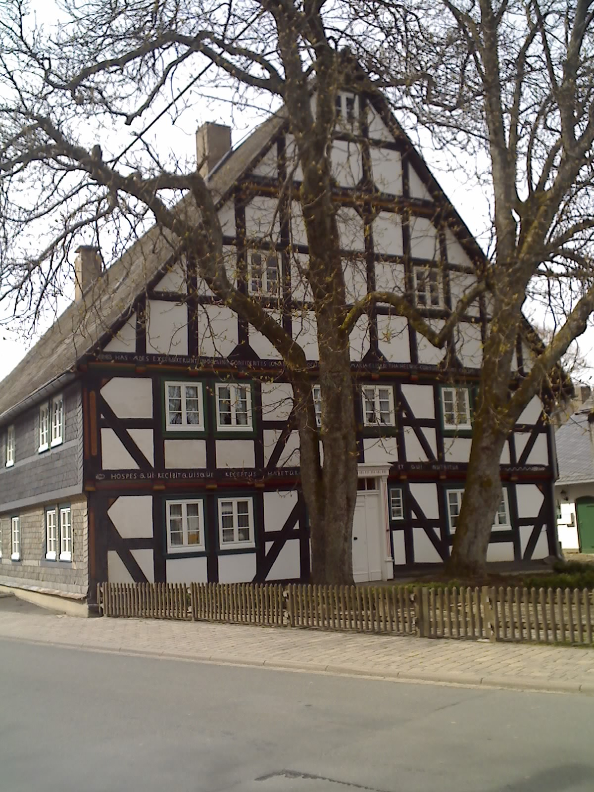 Fachwerkhaus Ewers-Padberg in Küstelberg (Medebach, Hochsauerlandkreis)